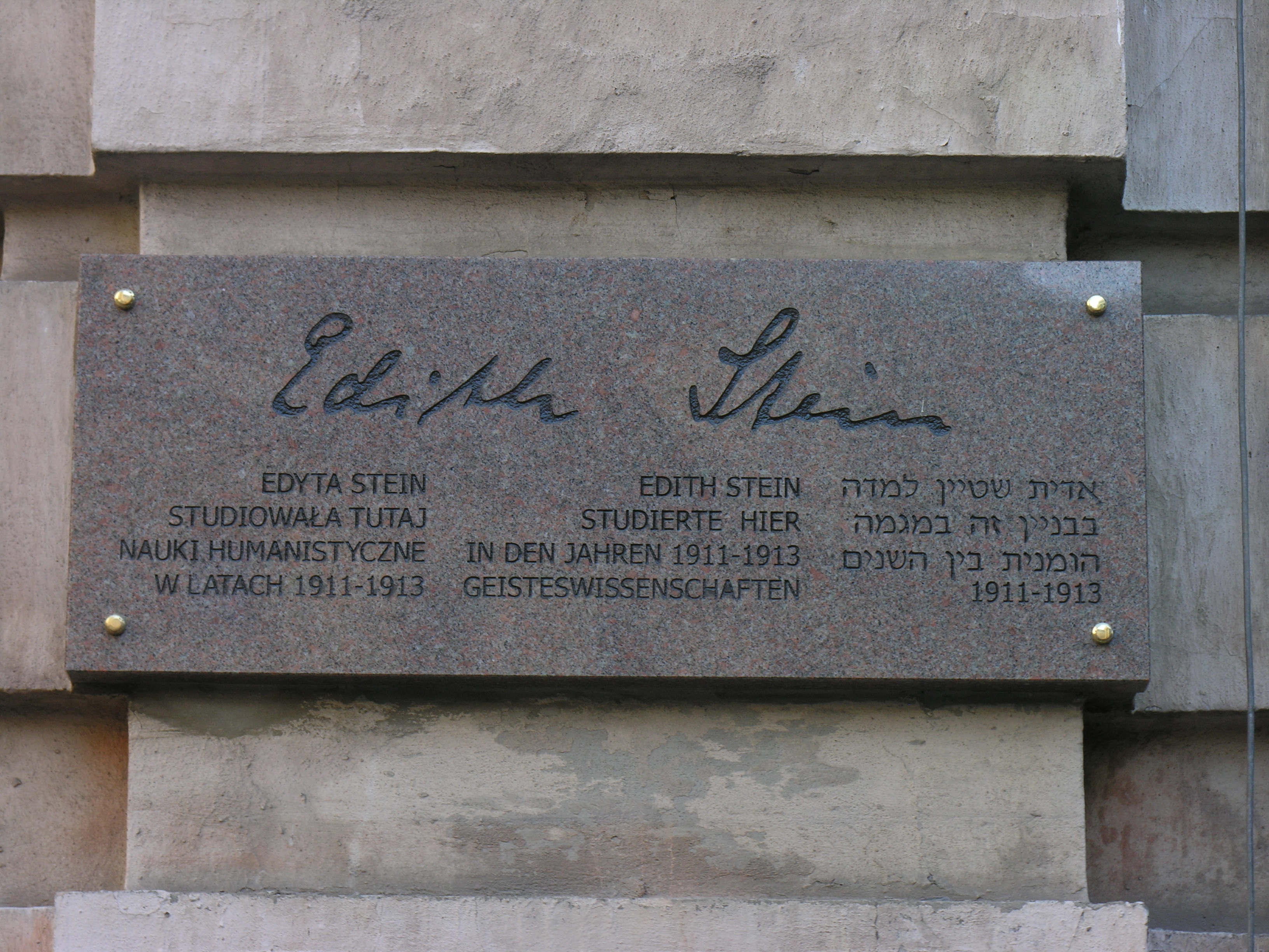 Tablica ku czci Edyty Stein na budynku przy ul. Kuźniczej 35